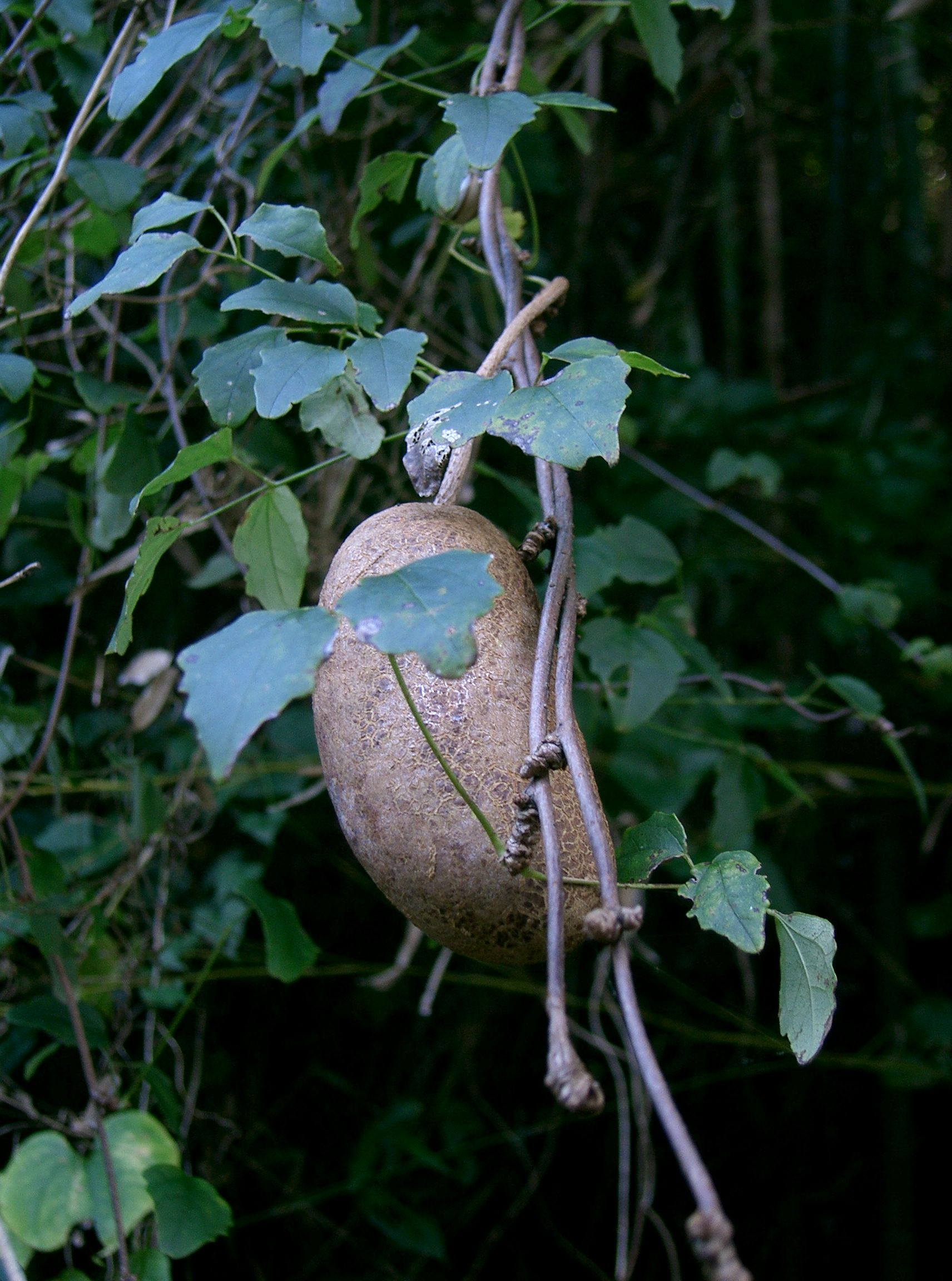 Akebia trifoliata